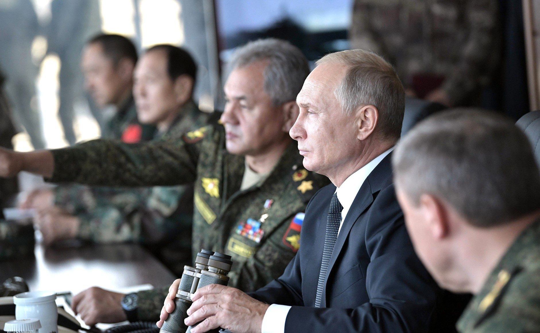 Основной этап манёвров «Восток-2018» на полигоне Цугол в Забайкальском крае.